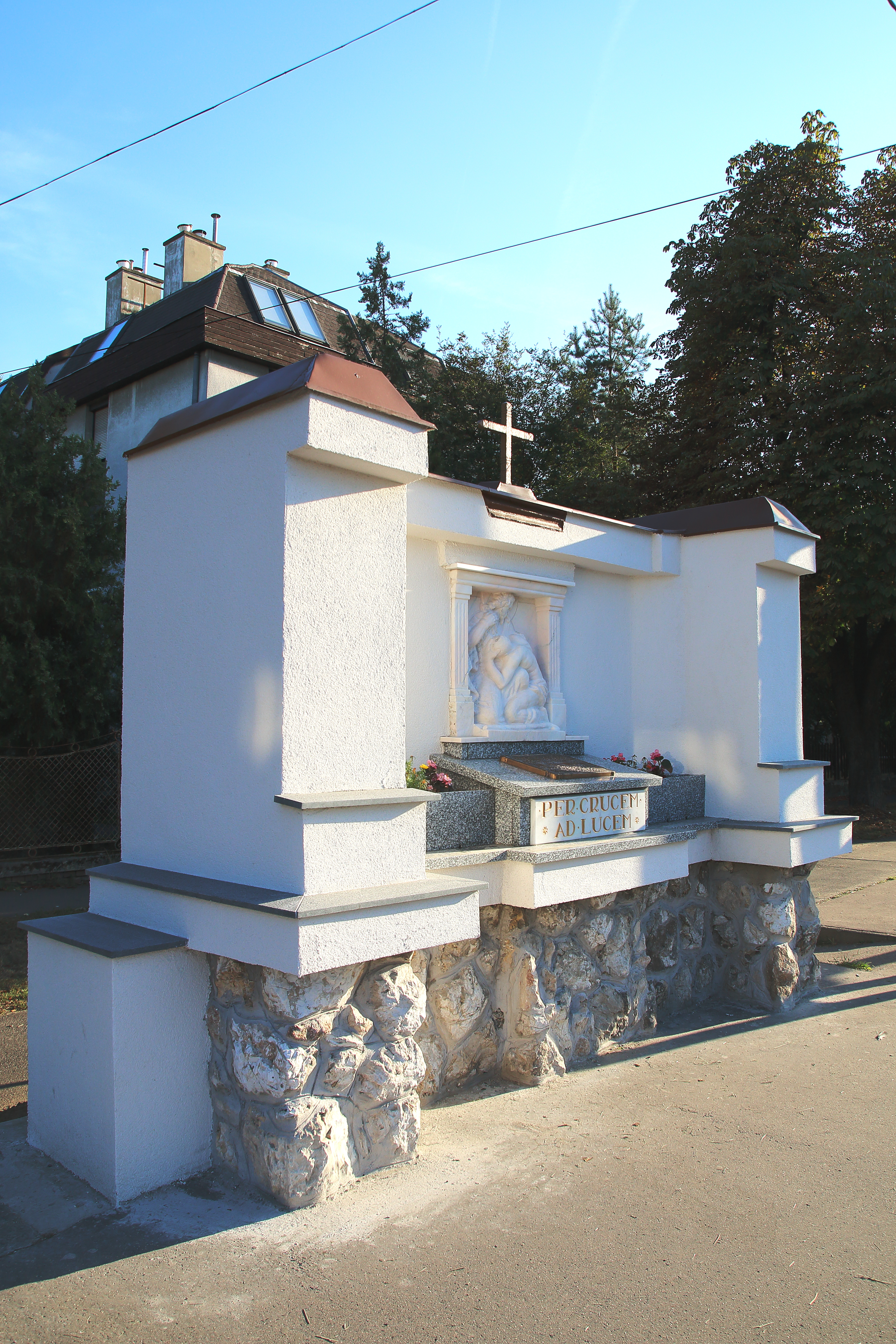 A Király Miklós emlék, 2019-es felújítását követően - „Az emlékmű örök időkön át hirdetni fogja azok dicső emlékét, akik fiatal életükkel pecsételték meg rajongásukat a motorkerékpársport iránt.“ írta a Nemzeti Sport, 1926. augusztus 29-én.Baranyi Károly alkotása